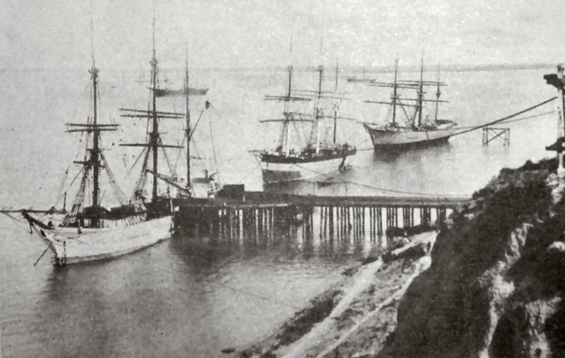 Embarcadero del Ferrocarril Oeste Santafesino que existia en 1895 frente a las barrancas donde hoy se encuentra el Parque Urquiza